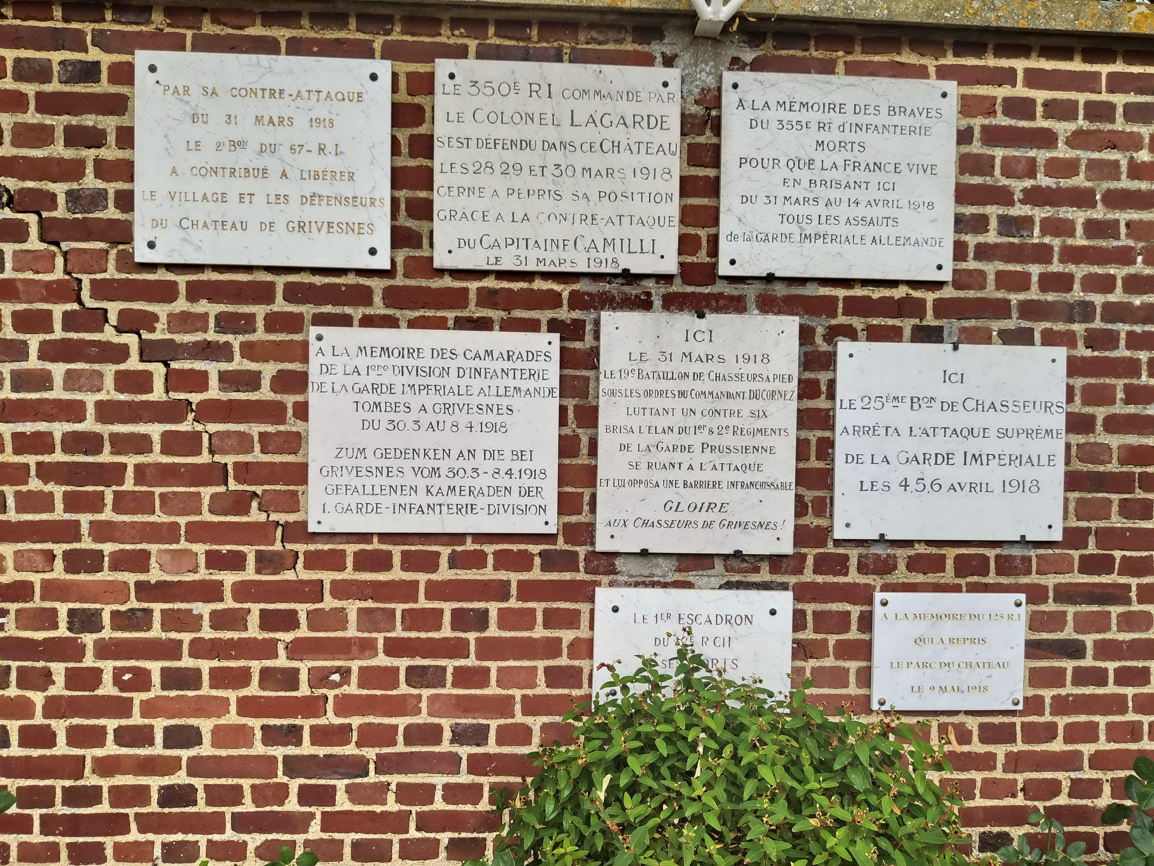 Grivesnes - Monument aux morts